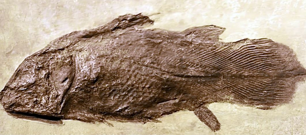 Fósil de celacanto delas Comores conocido por el nombre científico de latimeria chalumnae encontrado en 1938